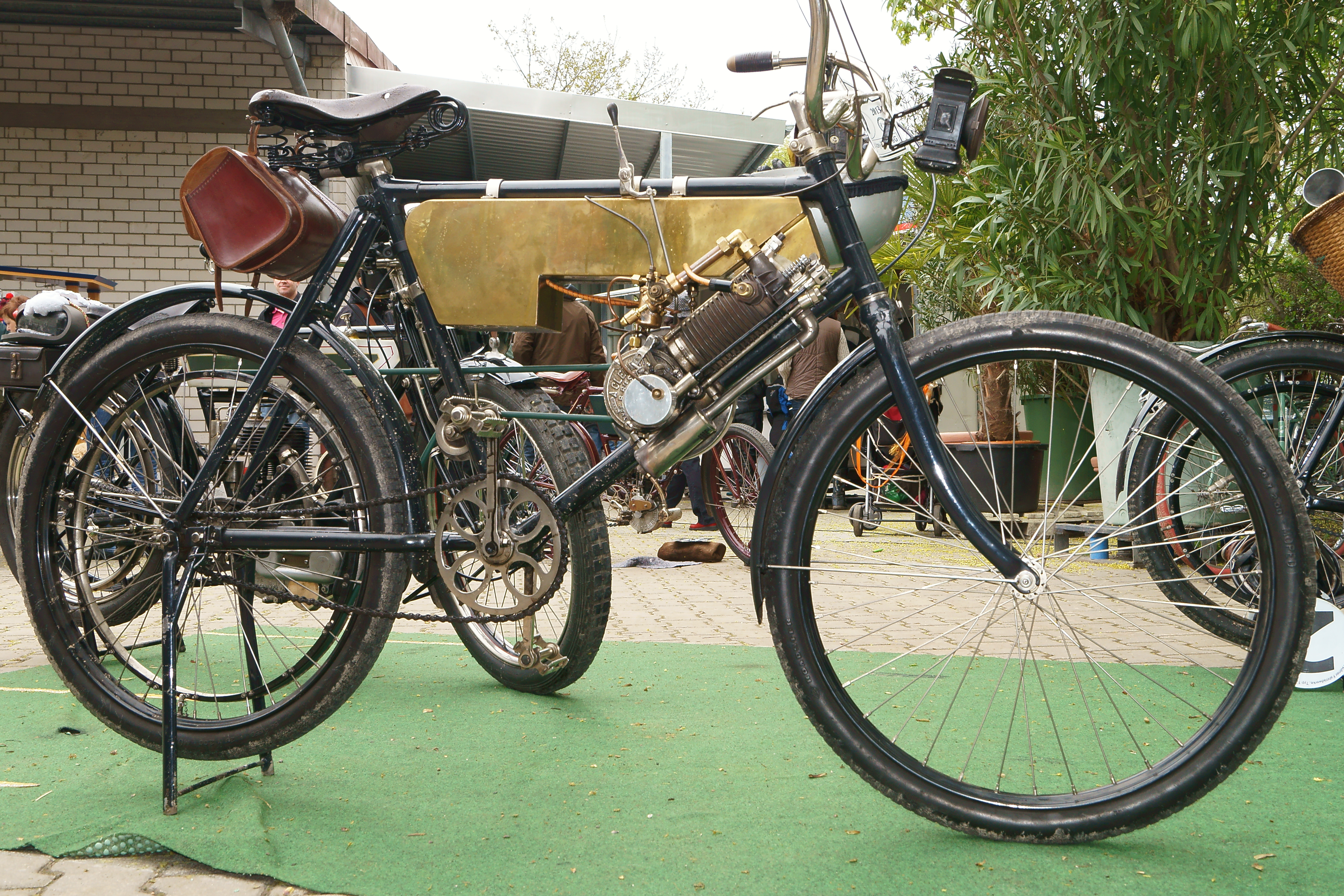 Eine Clement Autocyclette B aus dem Jahr 1902. Einzylinder mit 142 ccm.